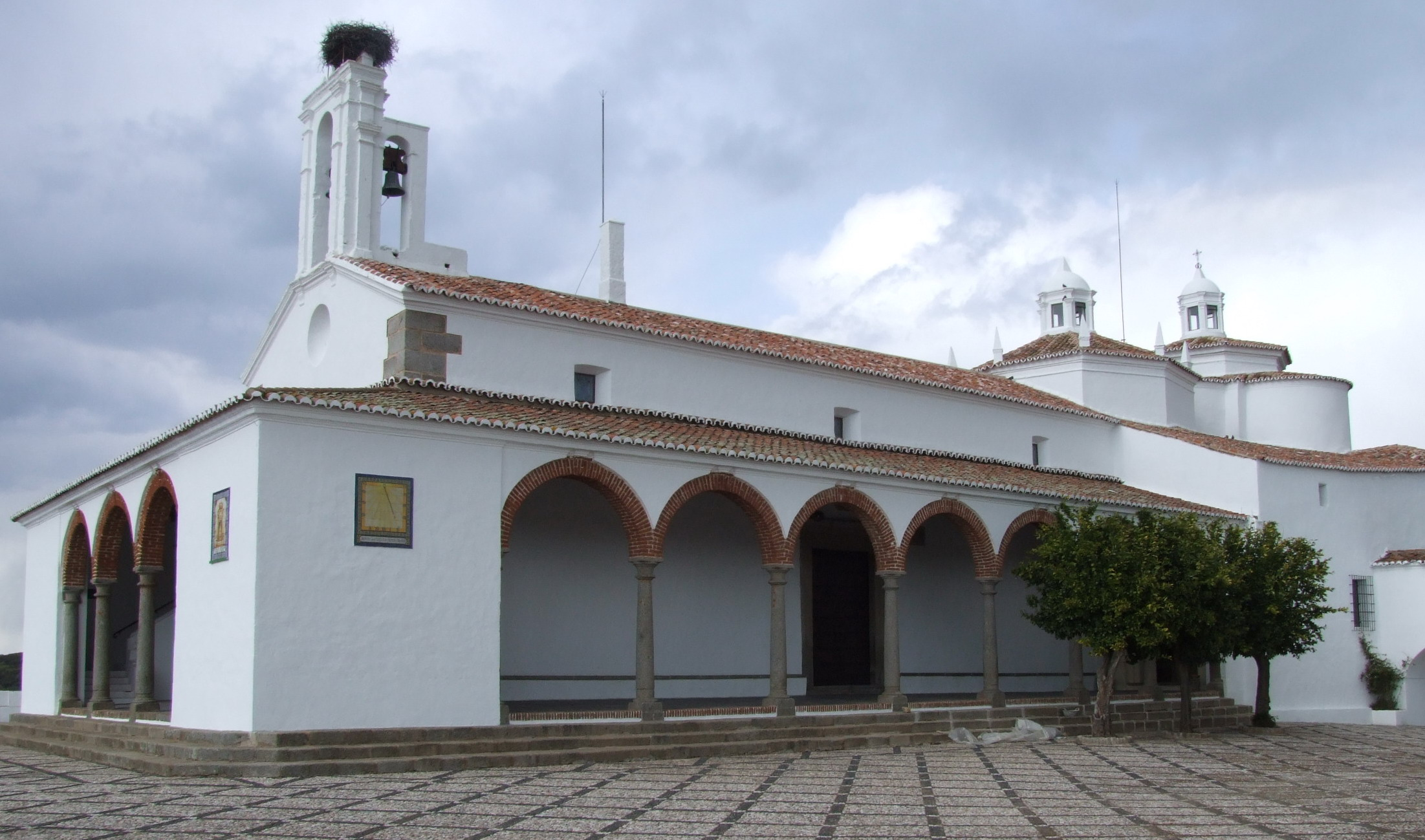 Santuario